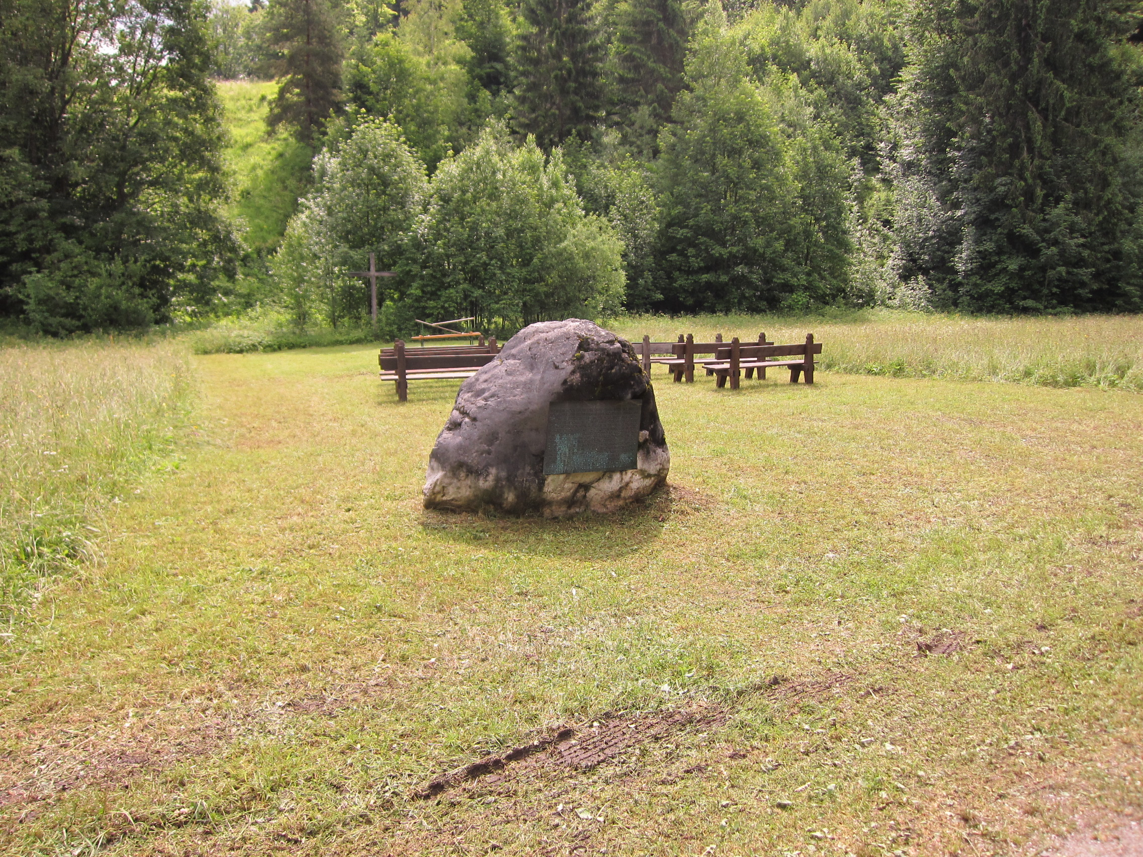 Ehemaliger Platz des Klosters Scharnitz in Klais; hier bestuhlt für einen Open-Air-Gottesdienst